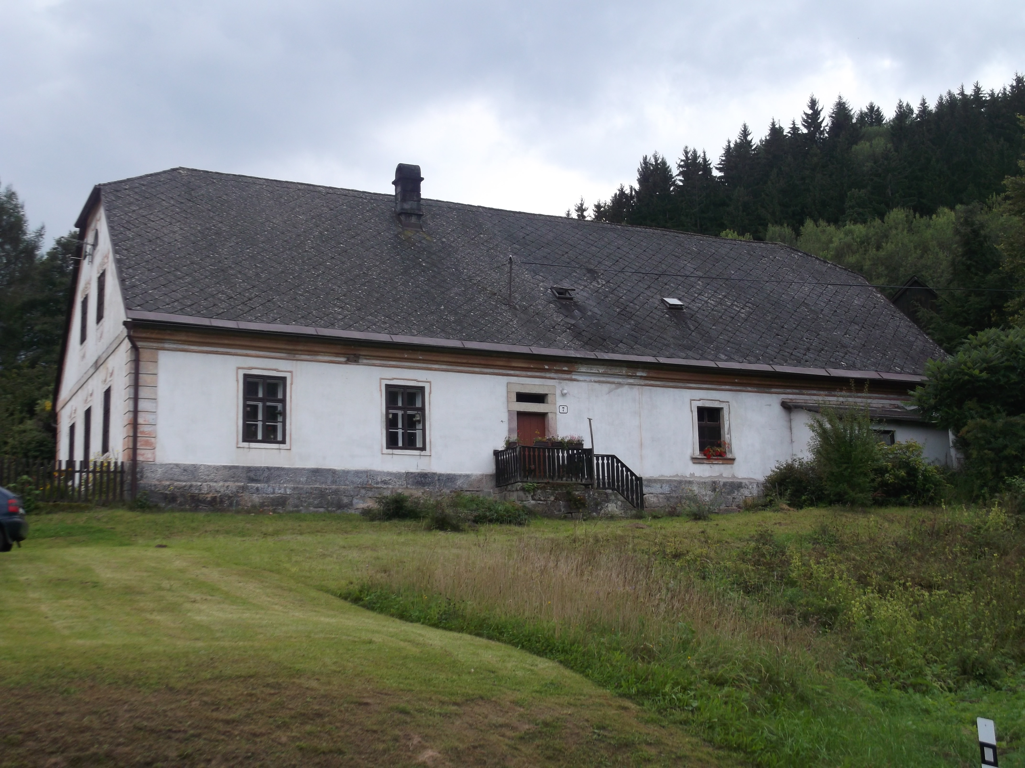 Dům čp. 7, Debrné.